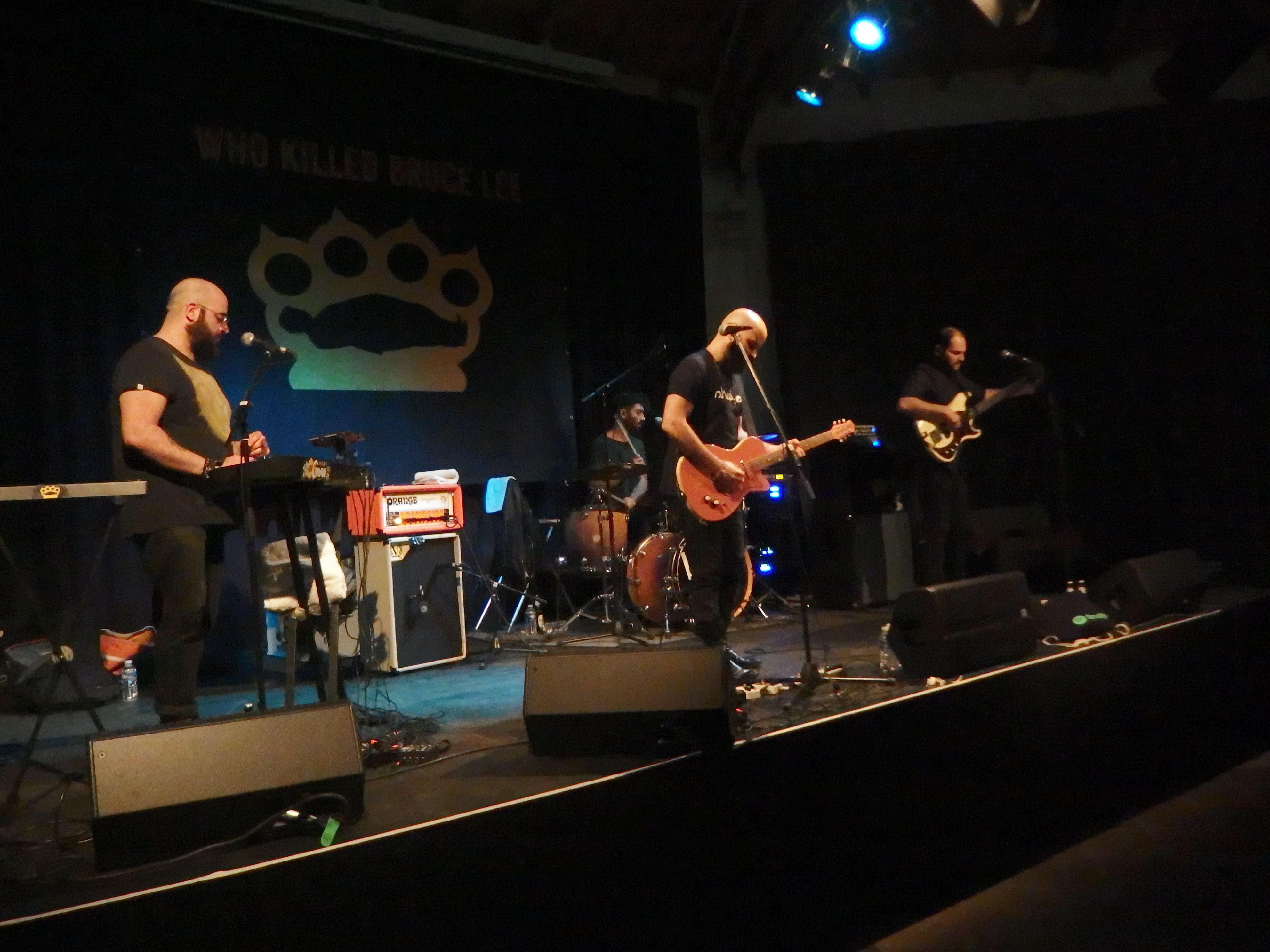 Who Killed Bruce Lee live in Neunkirchen (Saar)